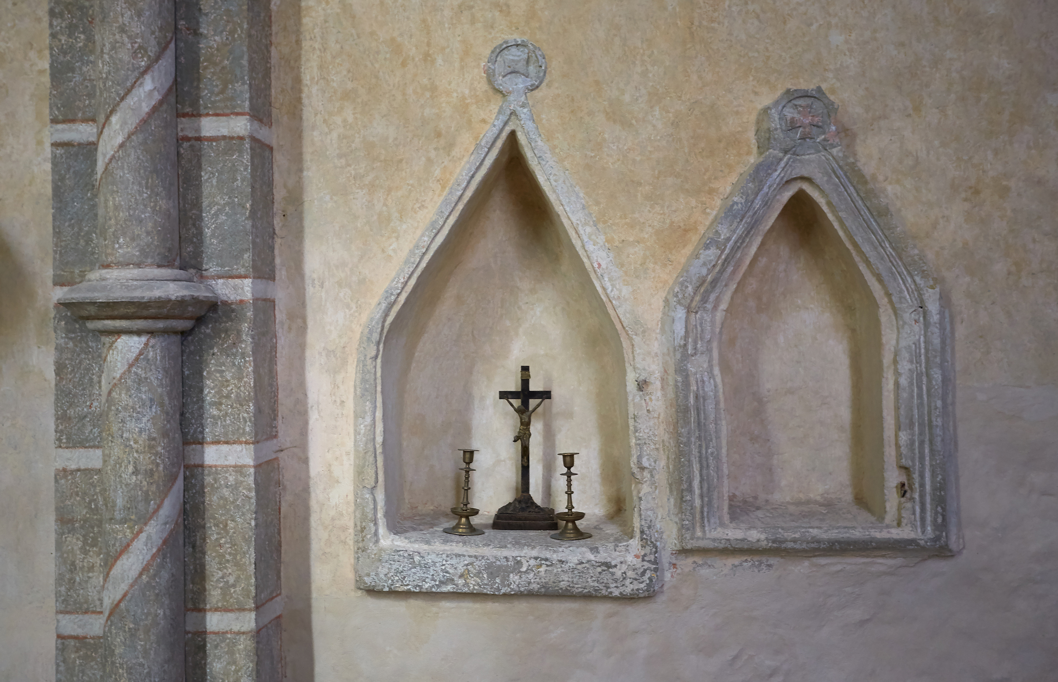 Kihelkonna kiriku detail